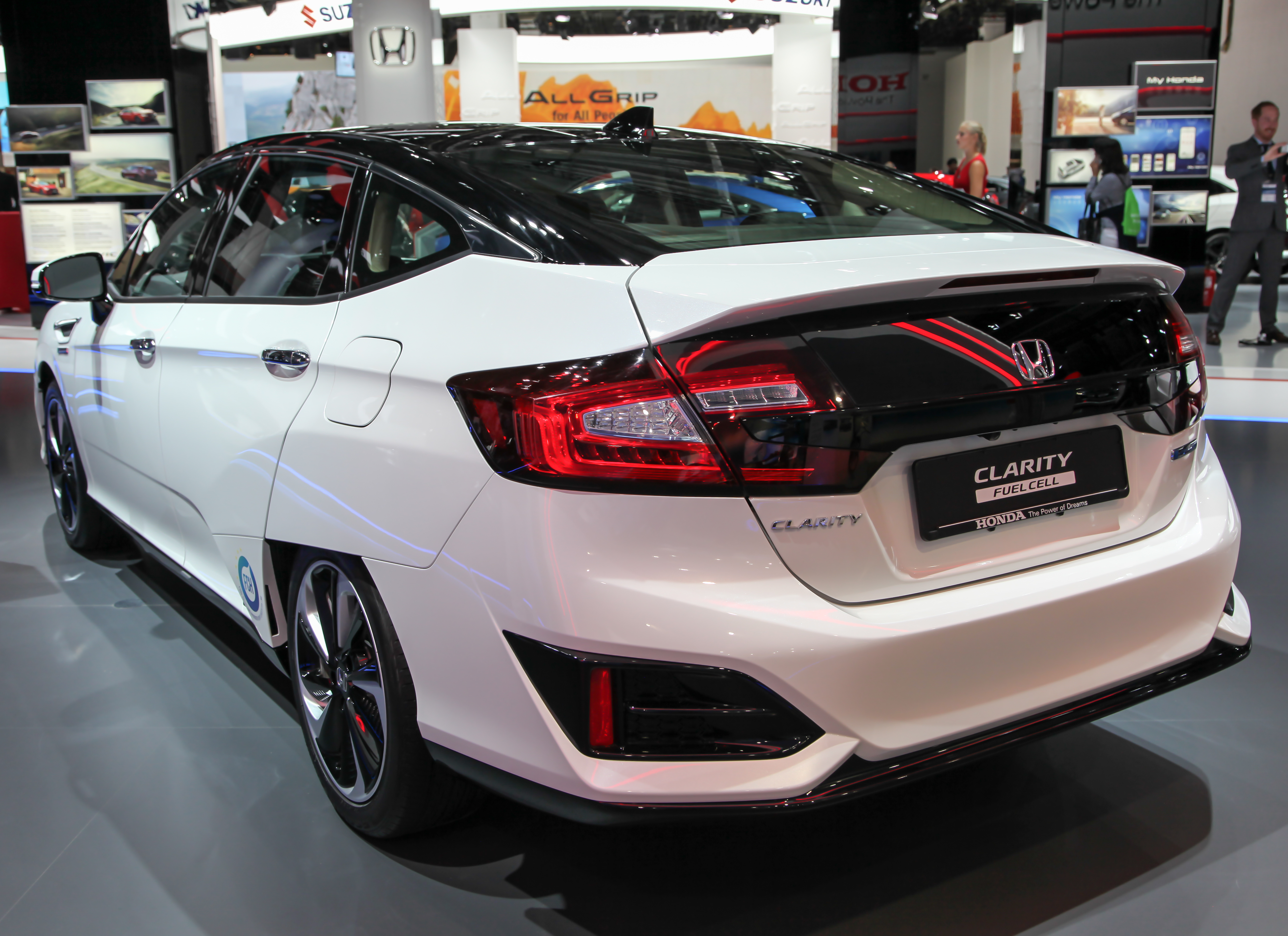 Honda Clarity Fuel Cell auf der IAA 2017